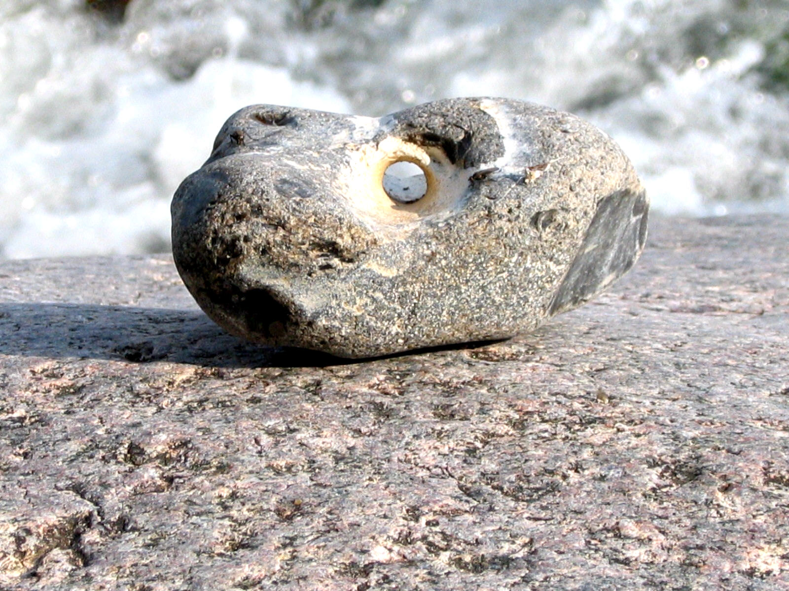 Hühnergott, Fundort: Sassnitz, Rügen